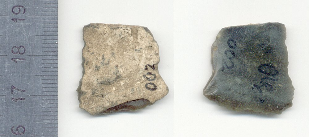 Odłupek